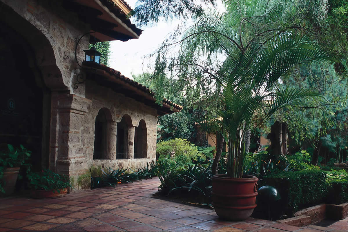 EXTERIOR QUINTA REAL GUADALAJARA